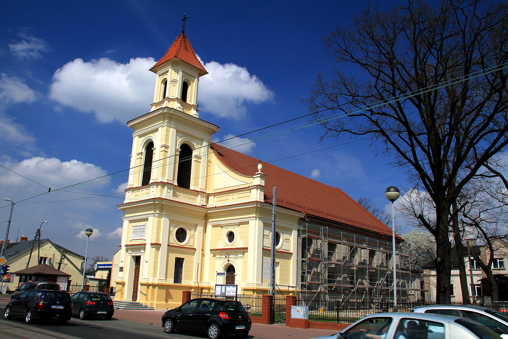 Kościół Św. Józefa Robotnika w Konstantynowie Łódzkim